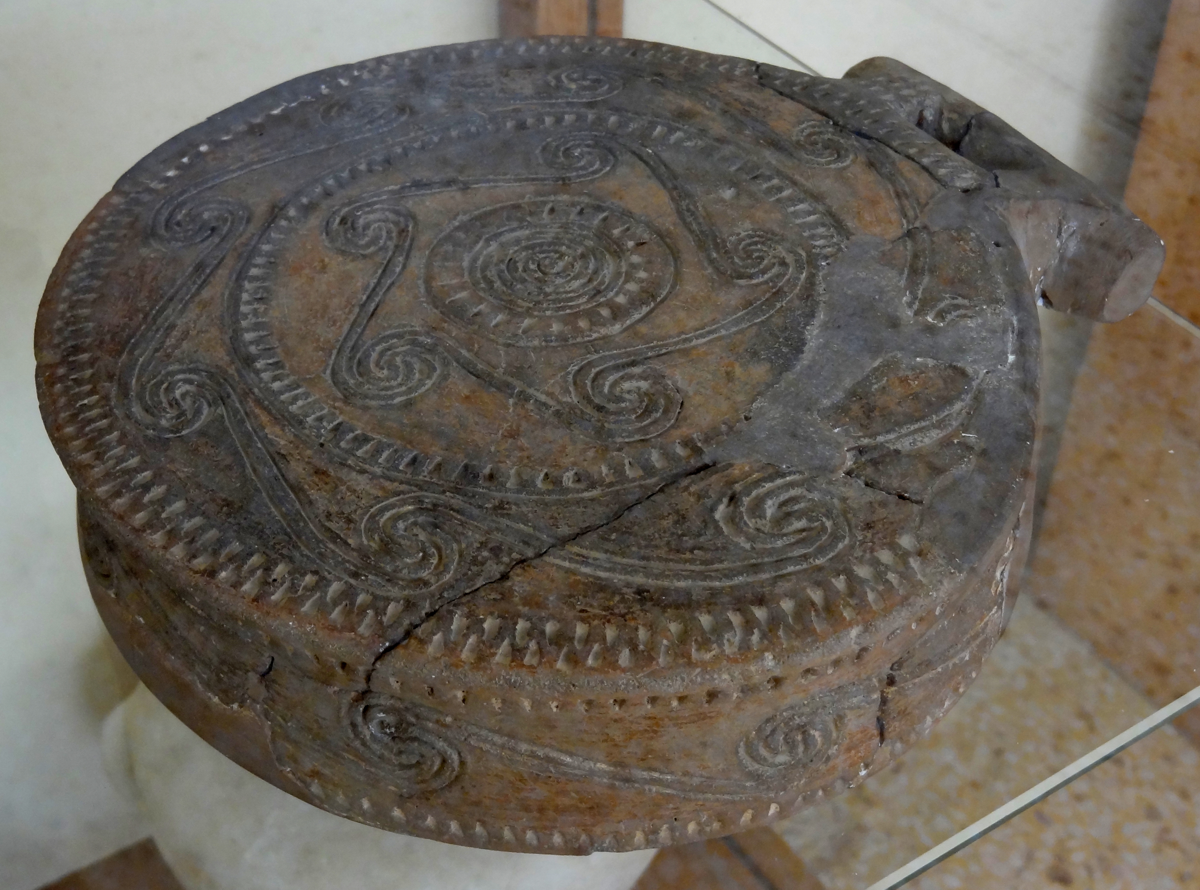 Kykladische Griffschale oder Kykladenpfanne aus Ton (2800–2700 v. Chr.), gefunden in Grab 3 auf dem Friedhof von Kampos im Südwesten von Paros, im Archäologischen Museum von Parikia auf Paros, Kykladen, Griechenland